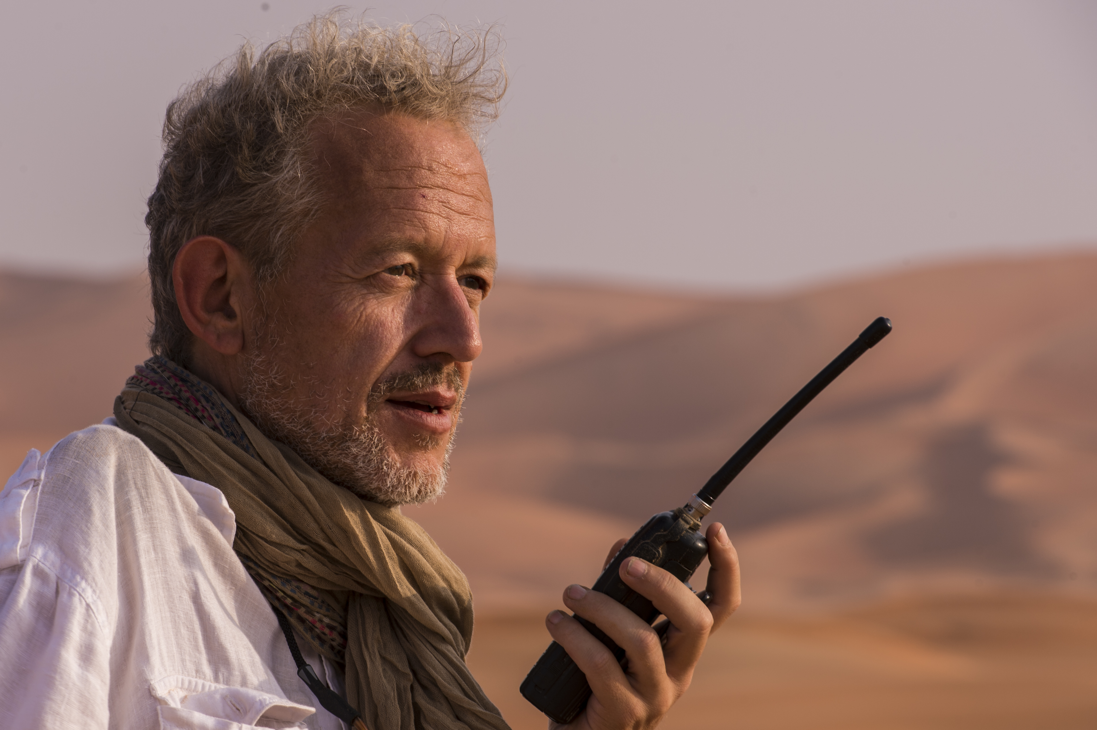 Dirk van den Berg beim Dreh in der Wüste Saudi-Arabiens